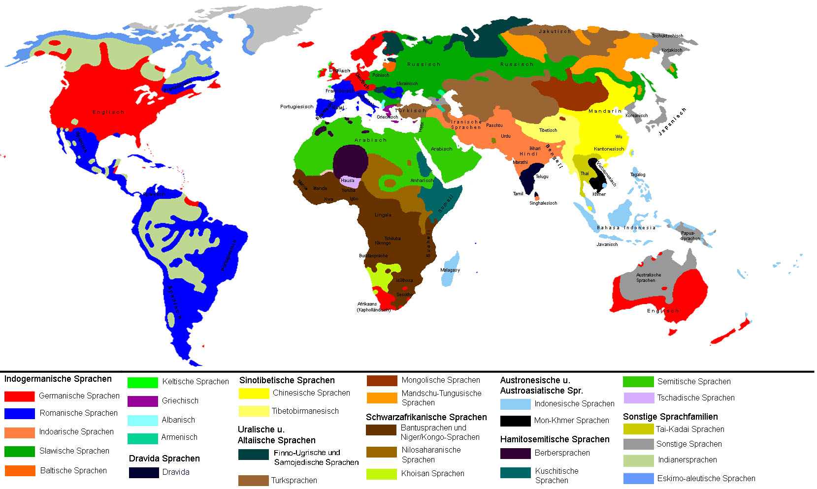 Darstellung der Sprachfamilien und ihre Untergruppen auf einer Weltkarte mit teilweiser Angabe einzelner Sprachen